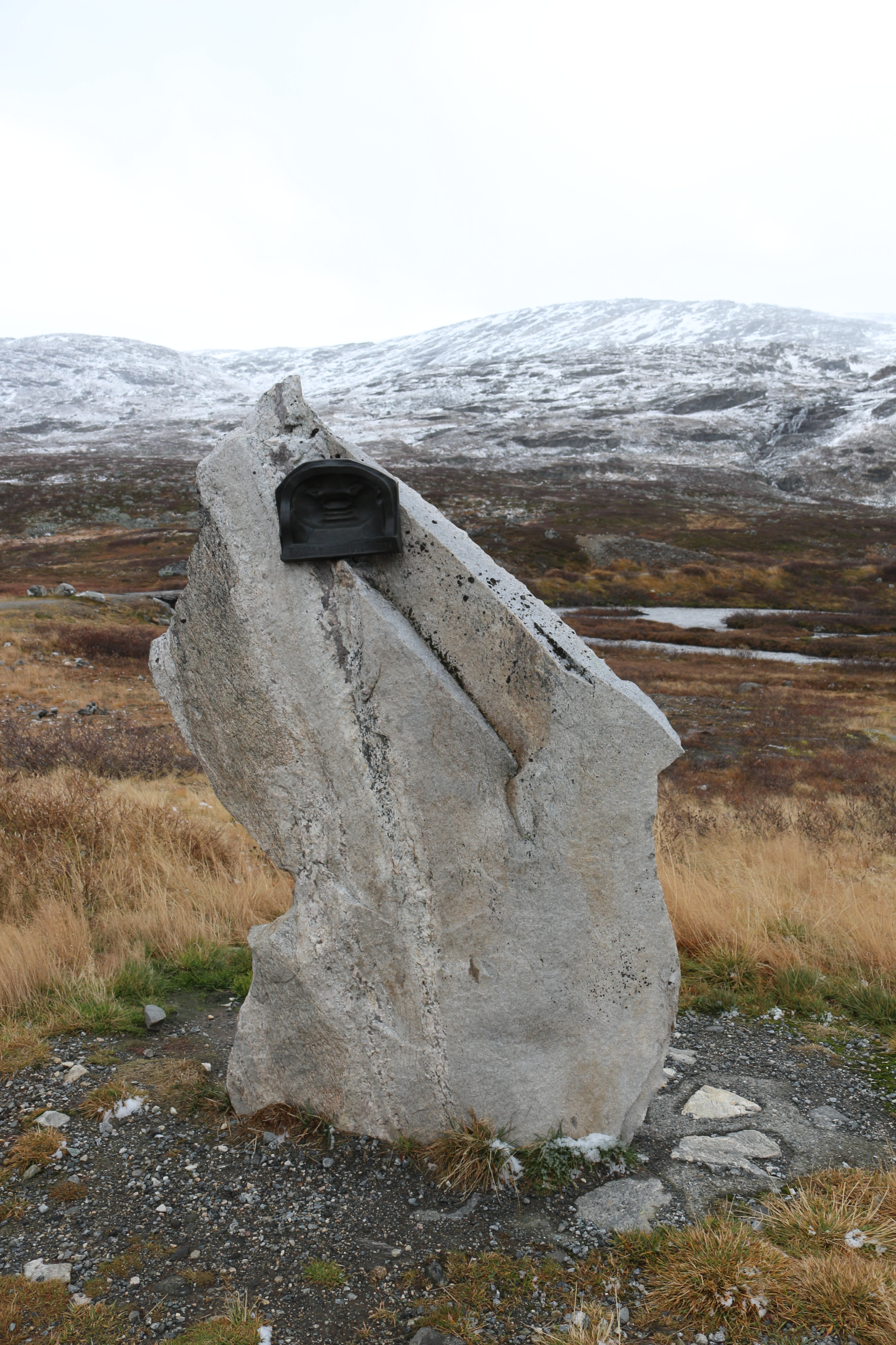 Strynefjellet ,Vakre vegers pris, 1988